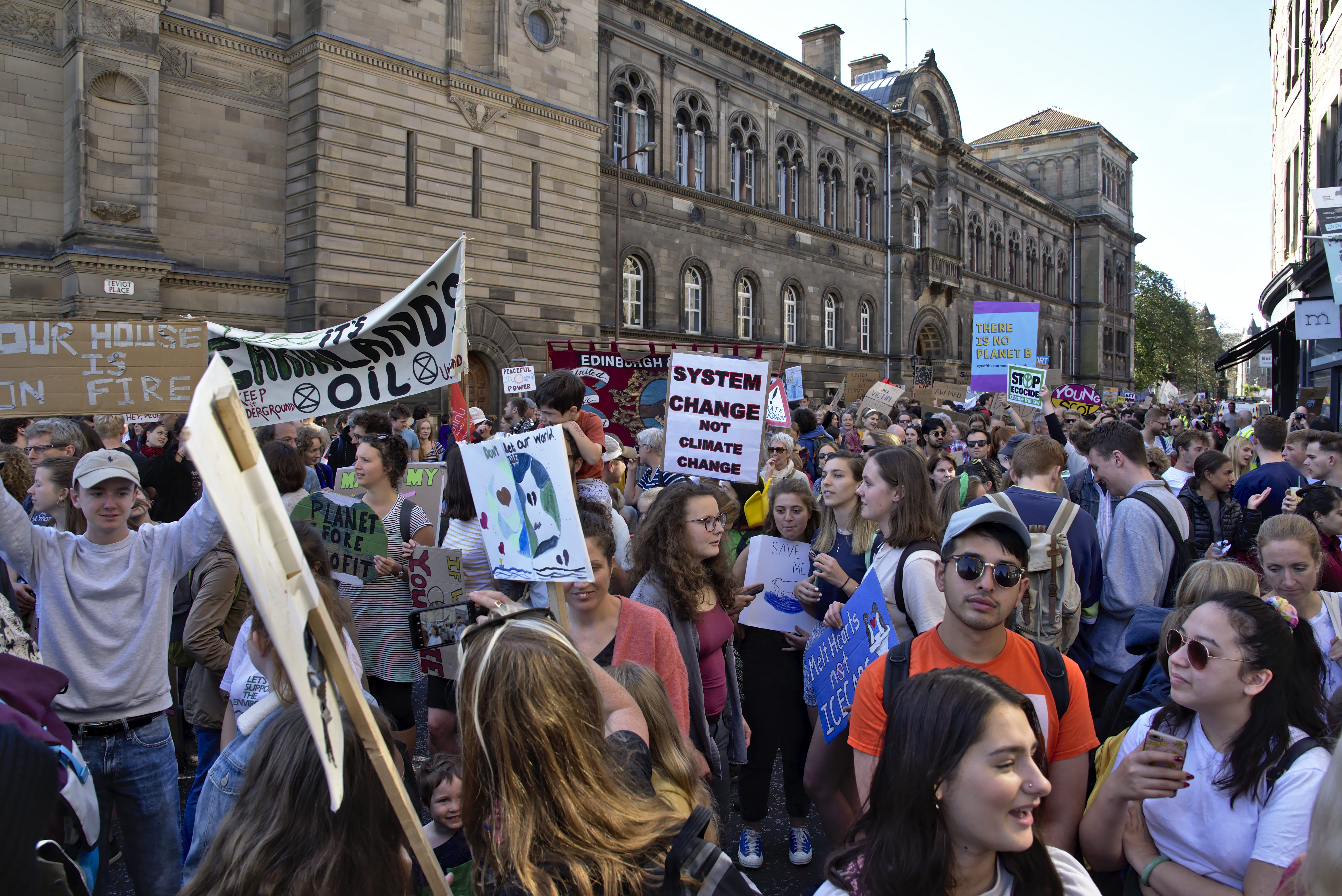 Global Climate Strike, Edinburgh